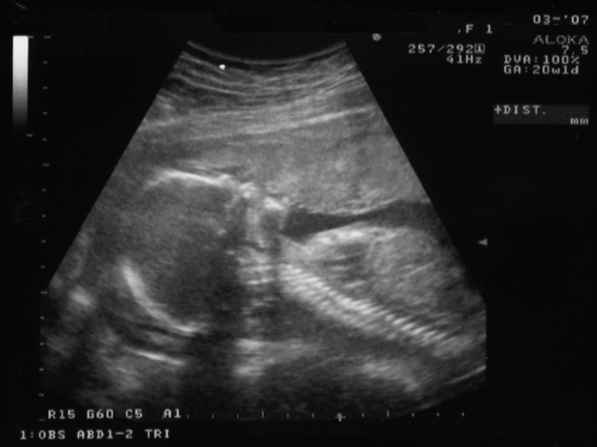 Ecografía (scan) de un feto de 20 semanas. Realizada externamente, por encima de la tripa. Se puede apreciar la cabeza, la espina dorsal y el corazón. El feto pesa aproximadamente 360 gramos.